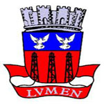 Brasão do Município de Candeias, Bahia, Brasil